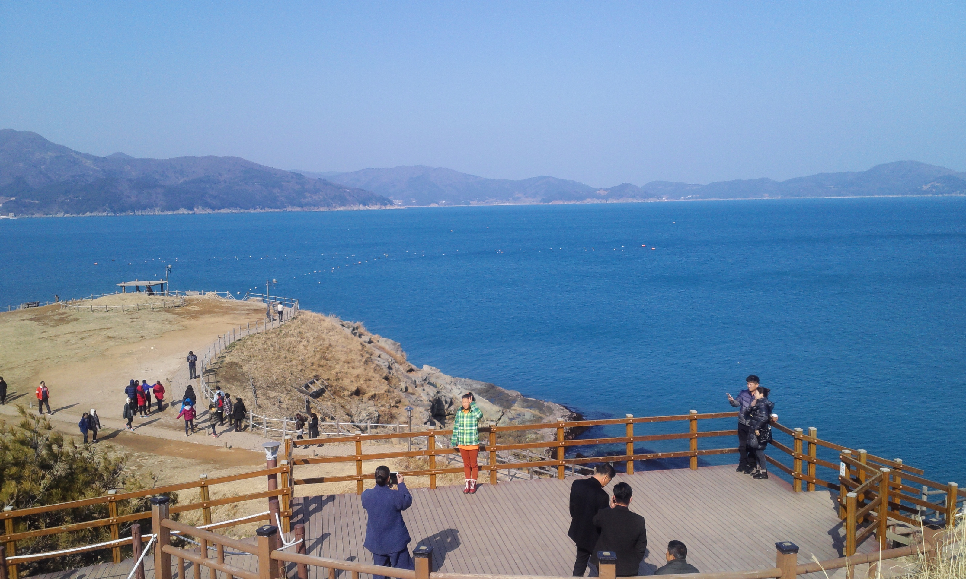 This Picture was taken on February 10th 2013.(2013년 설날의 바람의 언덕)